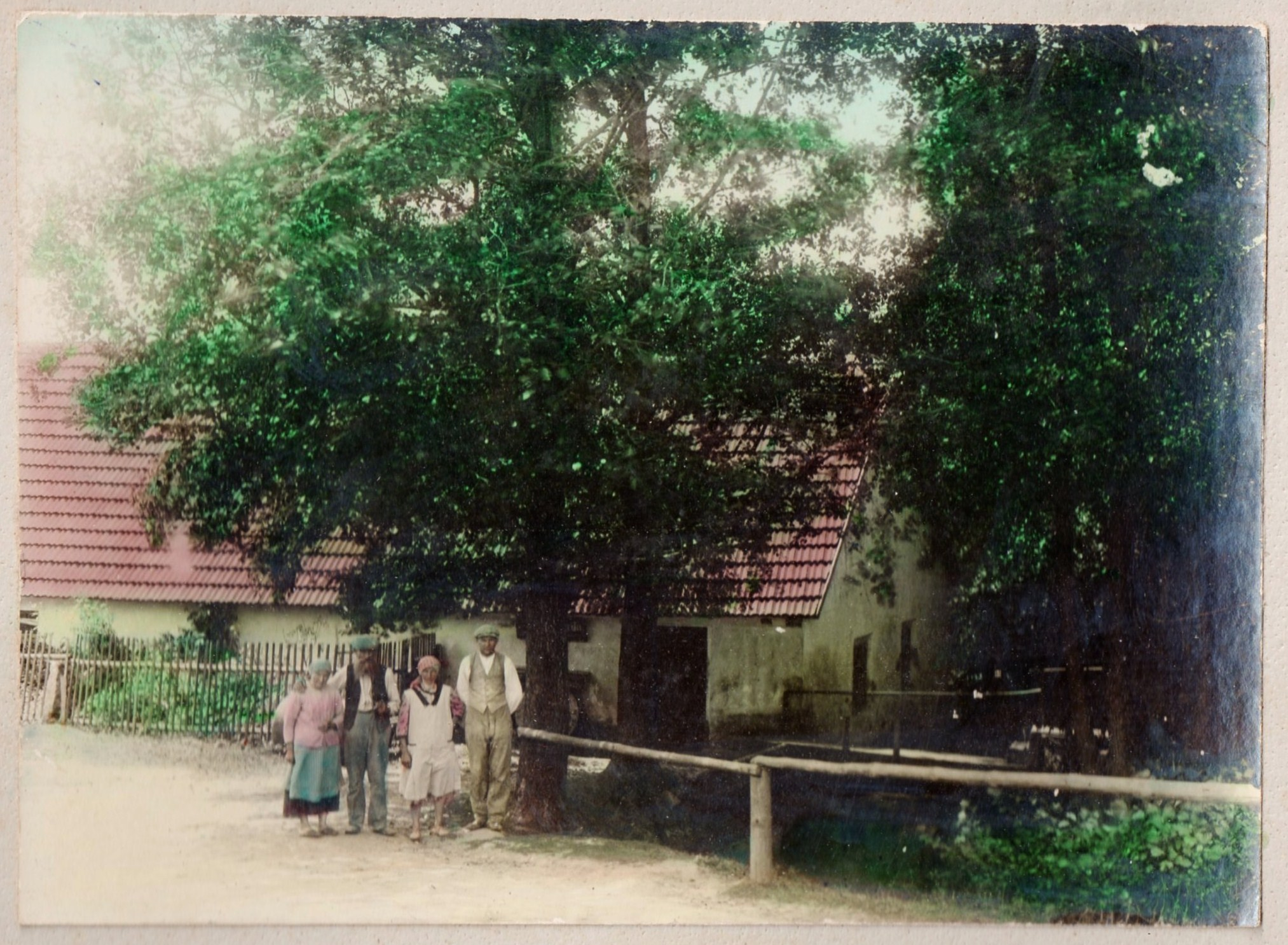 Pohled na mlýn, kolorovaná historická fotografie z počátku 20. století.